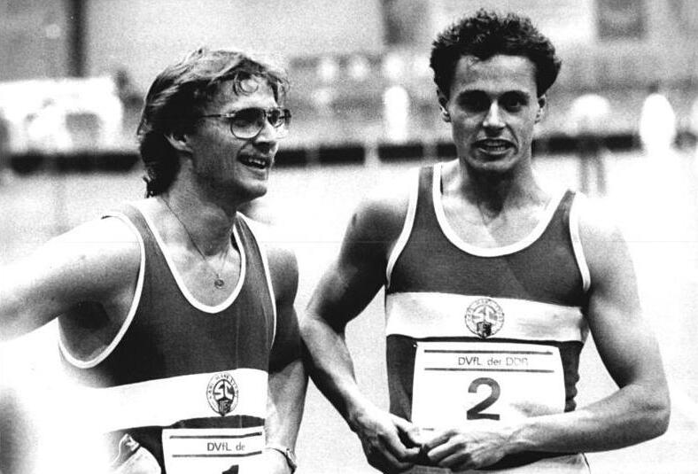 Thomas Schönlebe, Jens Carlowitz ADN-ZB Weisflog 27.2.88 Senftenberg: 25. DDR-Hallenmeisterschaften der Leichtathleten - DDR-Meister über 400 Meter wurde der Karl-Marx-Städter Thomas Schönlebe (l.) in 46,31 Sekunden vor seinem Klubkameraden Jens Carlowitz, der eine hundertstel Sekunde langsamer lief. Thomas Schönlebe Jens Carlowitz